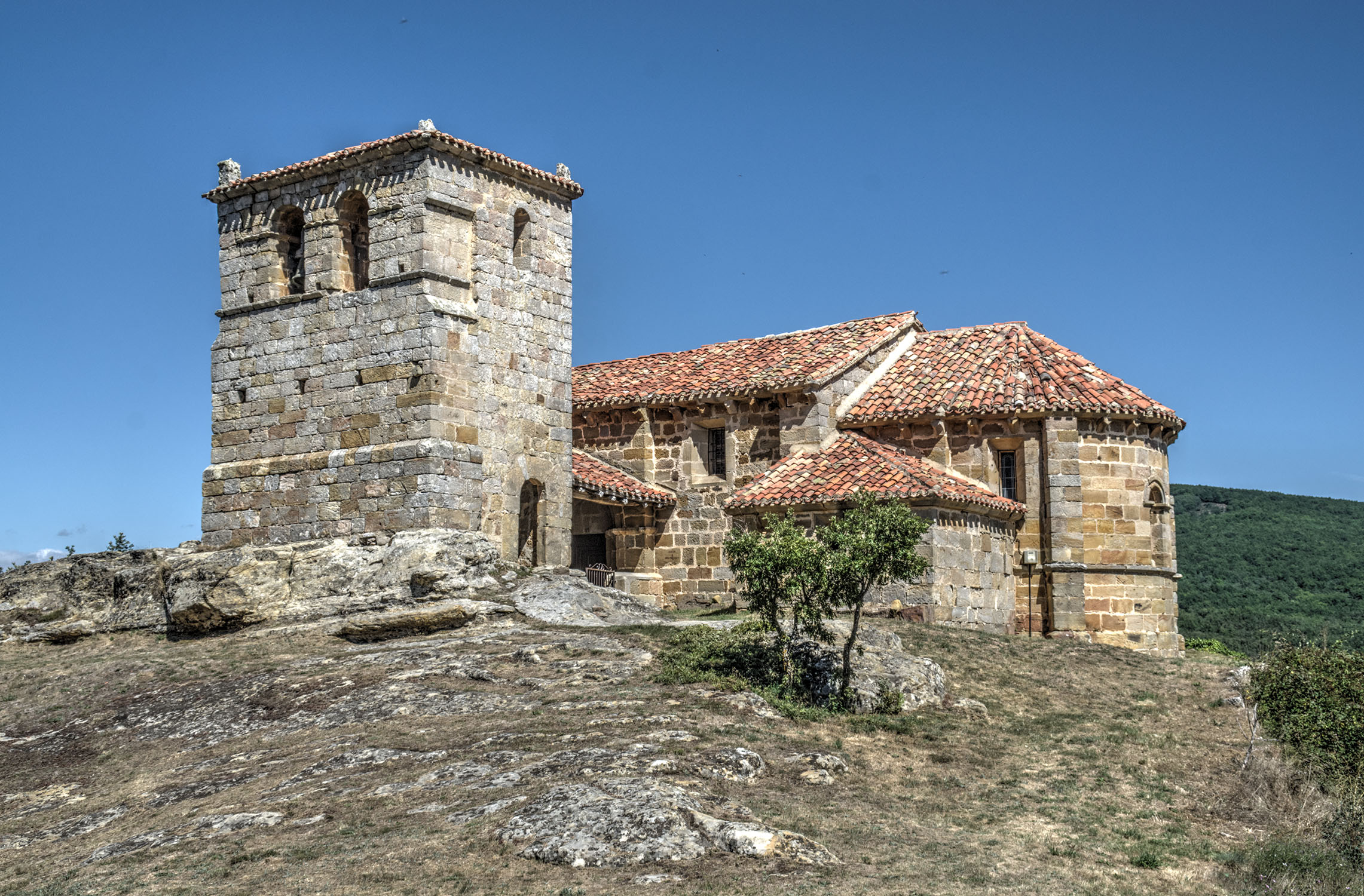 Iglesia románica de Santa Leocadia, en Castrillo de Valdelomar (Cantabria, España. Esta iglesia, datada en el siglo XIII, está construida sobre una necrópolis con tumbas antropomorfas excavadas en la roca. Castrillo de Valdelomar se encuentra en el municipio de Valderredible, en el sur de Cantabria.